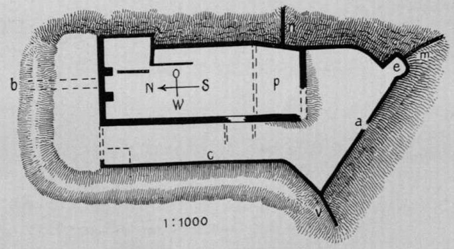 Grundriss der Burg Obervoitsberg in der Steiermark aus Otto Piper "Österreichische Burgen" Band 5